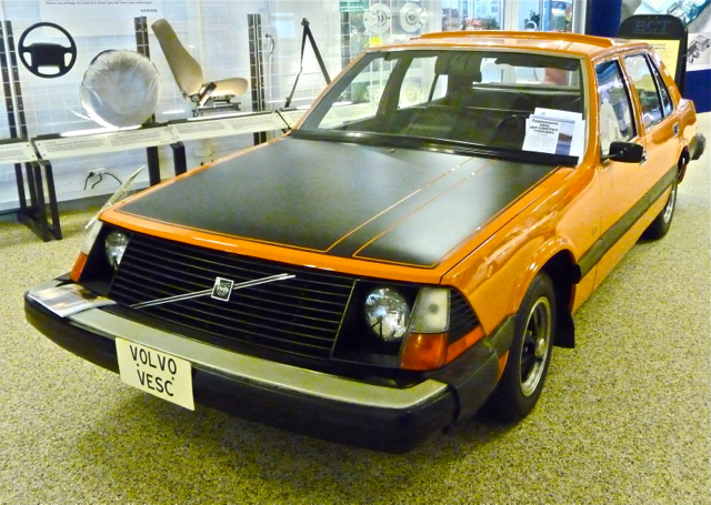 Volvo VESC, konceptbil från Volvo, 1972, Volvo Museum, Göteborg